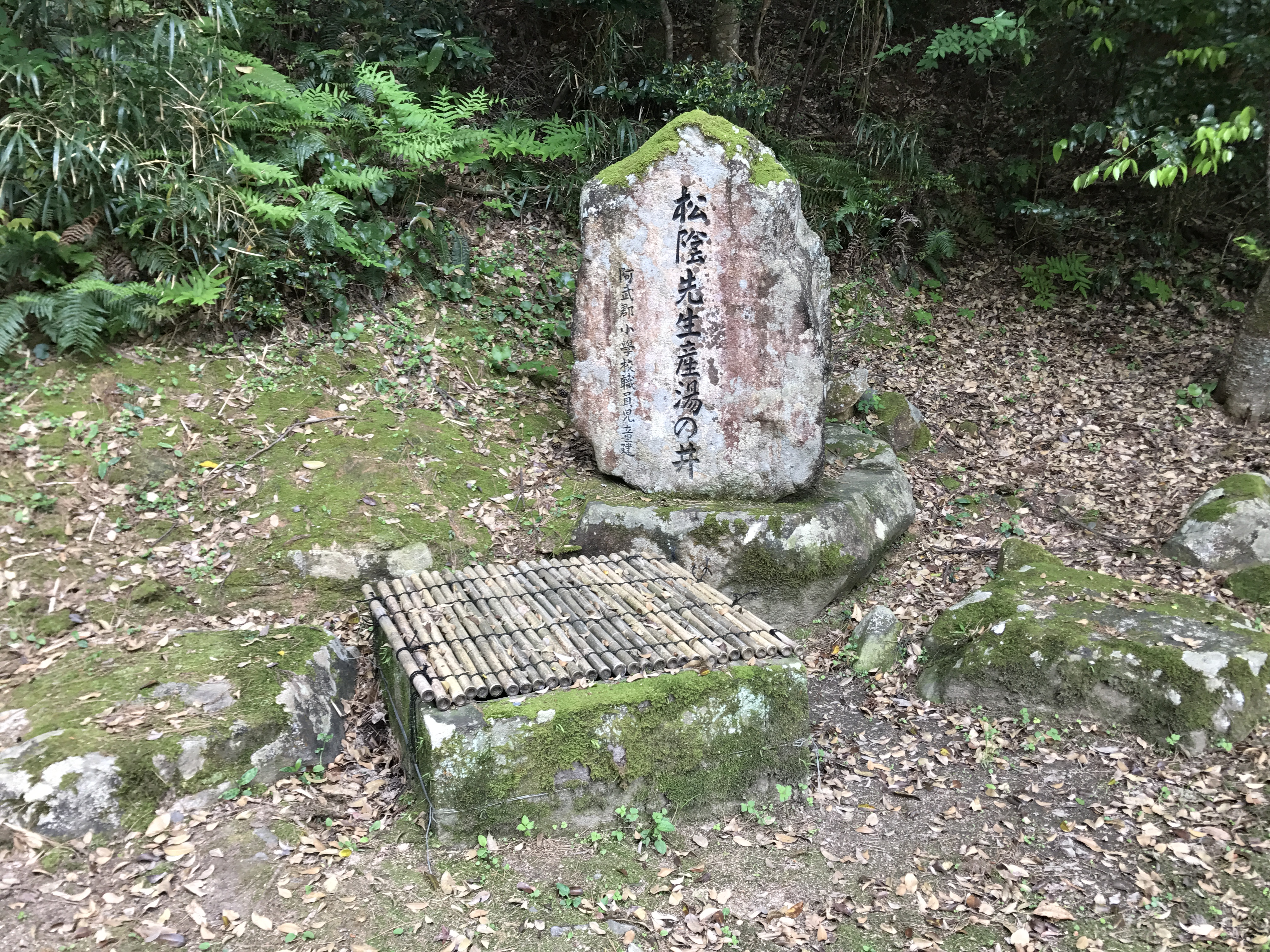 松陰先生産湯の井戸